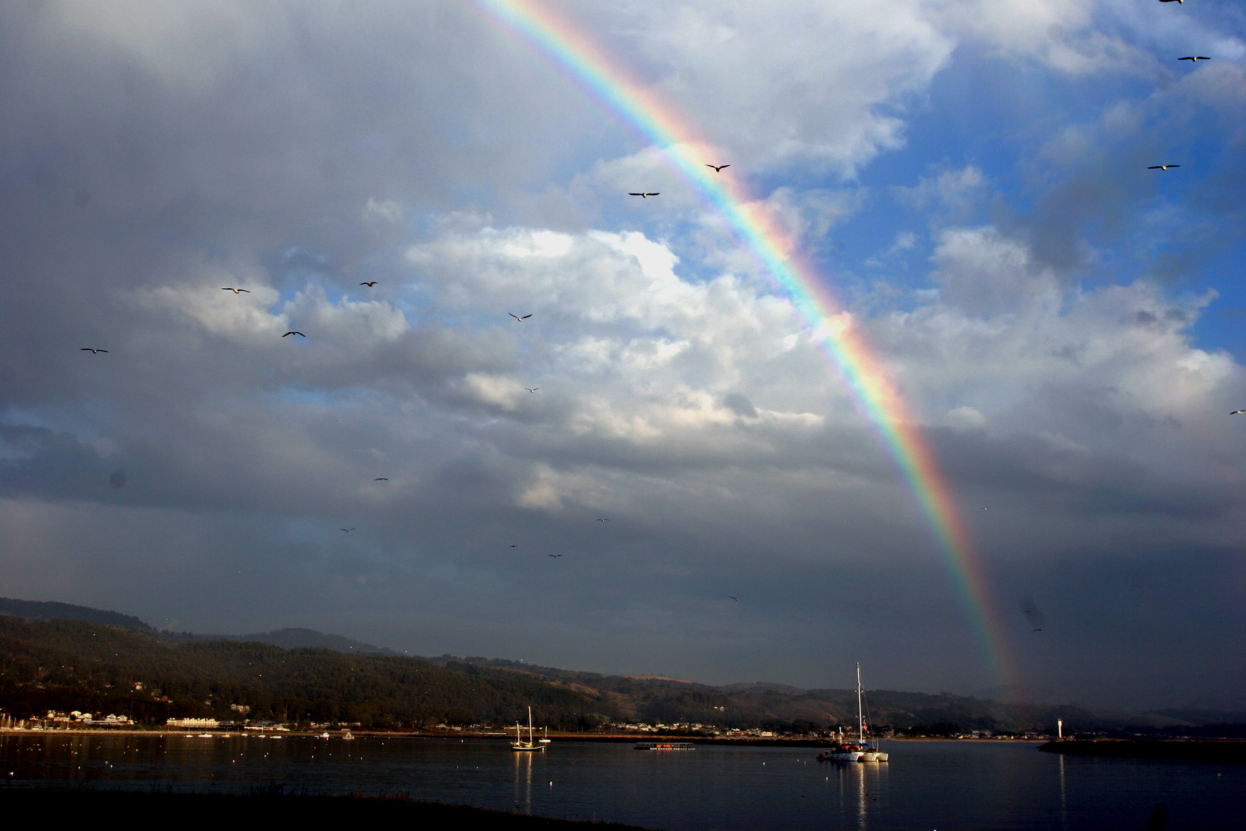 El Granada